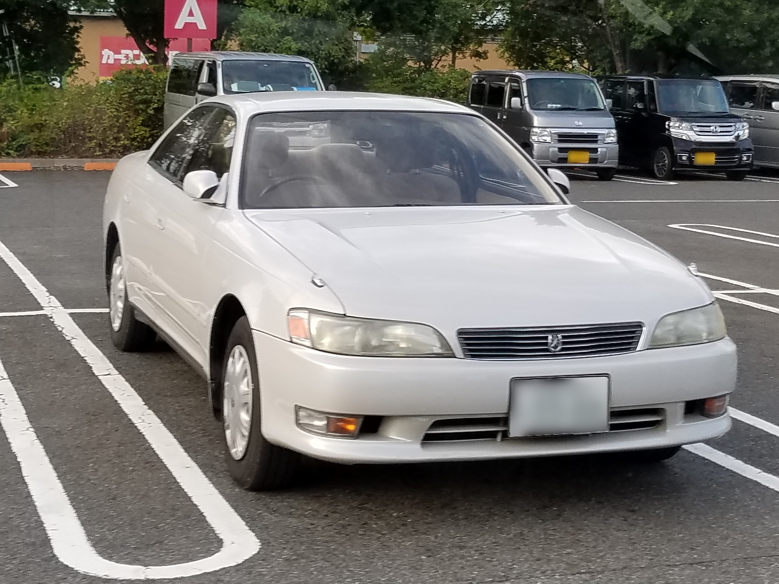 マークII グランデ(前期型)